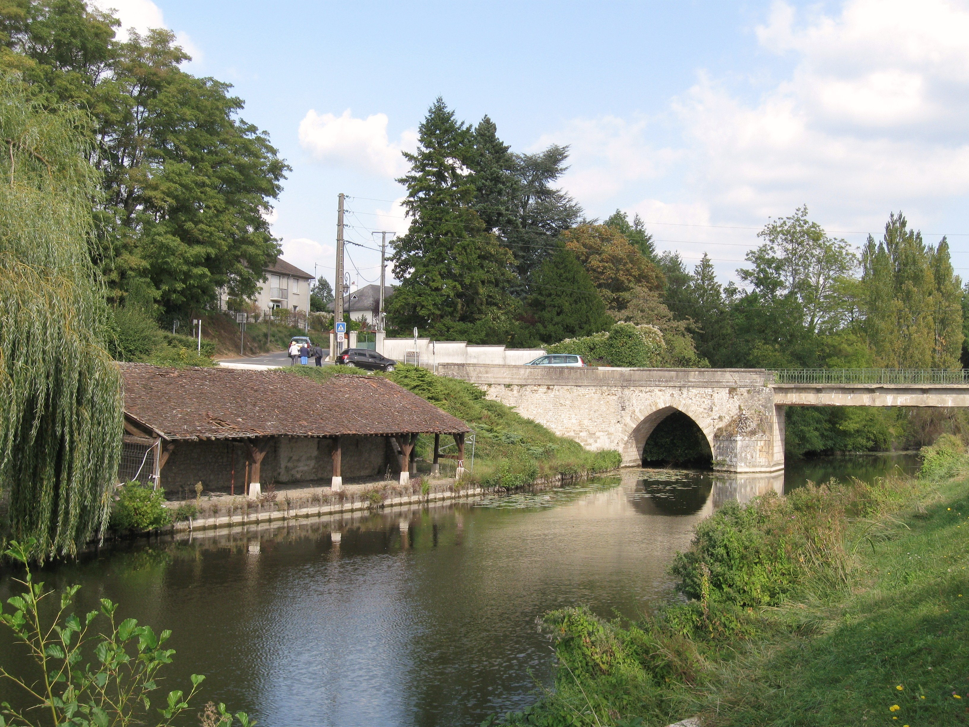 Canal d'Orléans, Chécy, Loiret, France